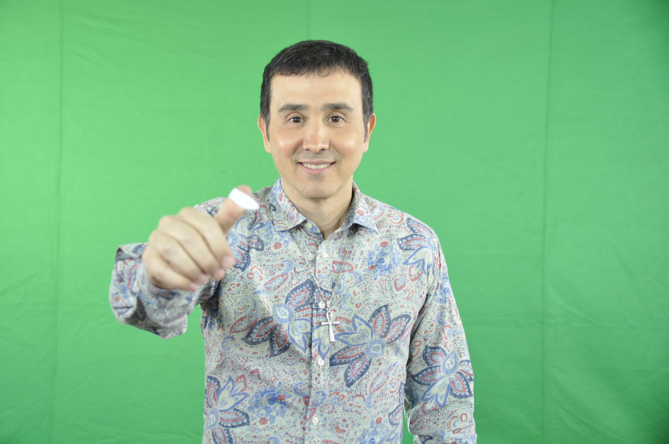 Sergio Villarreal - compositor y vocalista de "Grupo Ladrón"